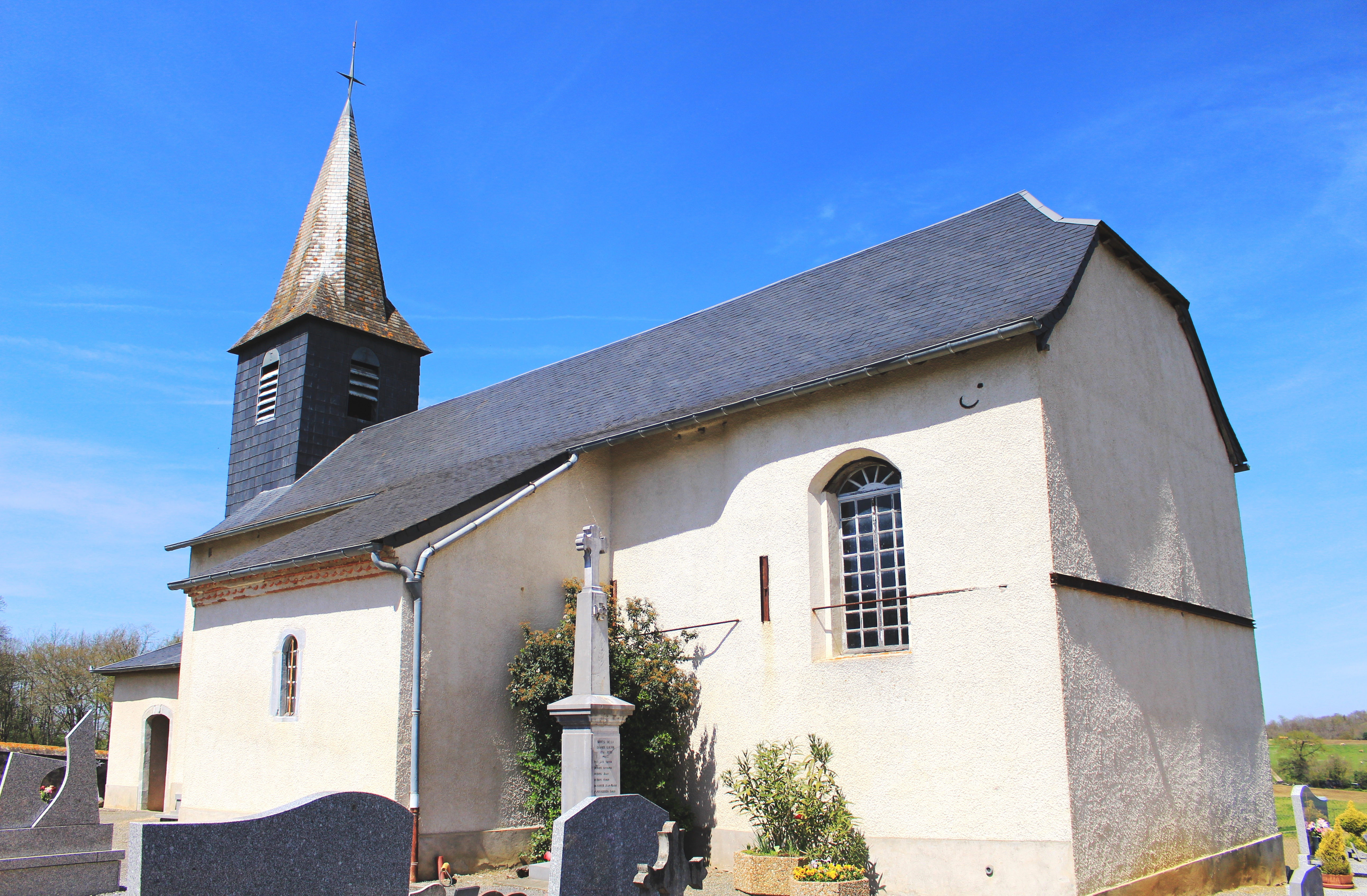 Église Sainte-Marie de Castéra-Lou (Hautes-Pyrénées)